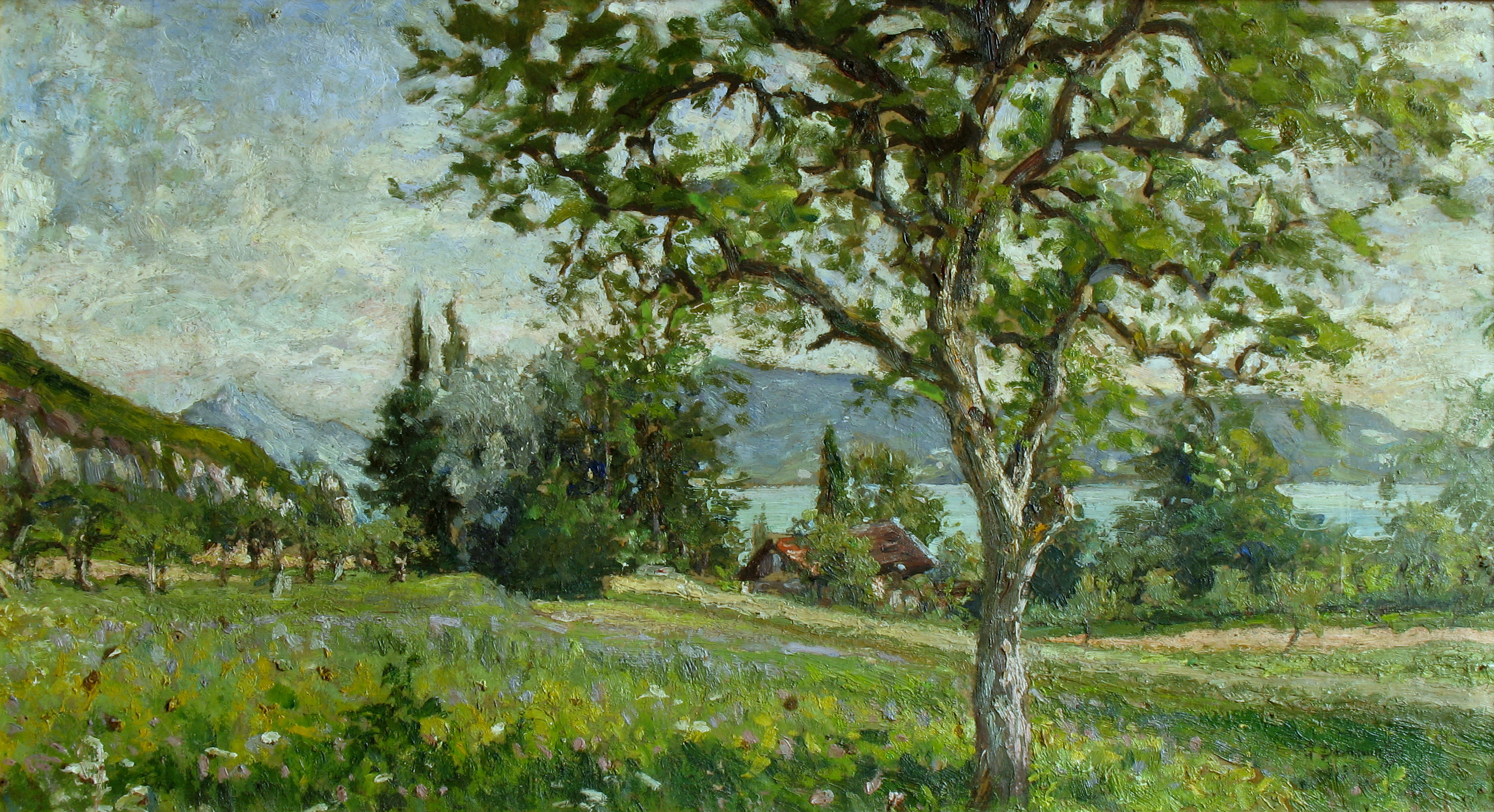 Un paysage.